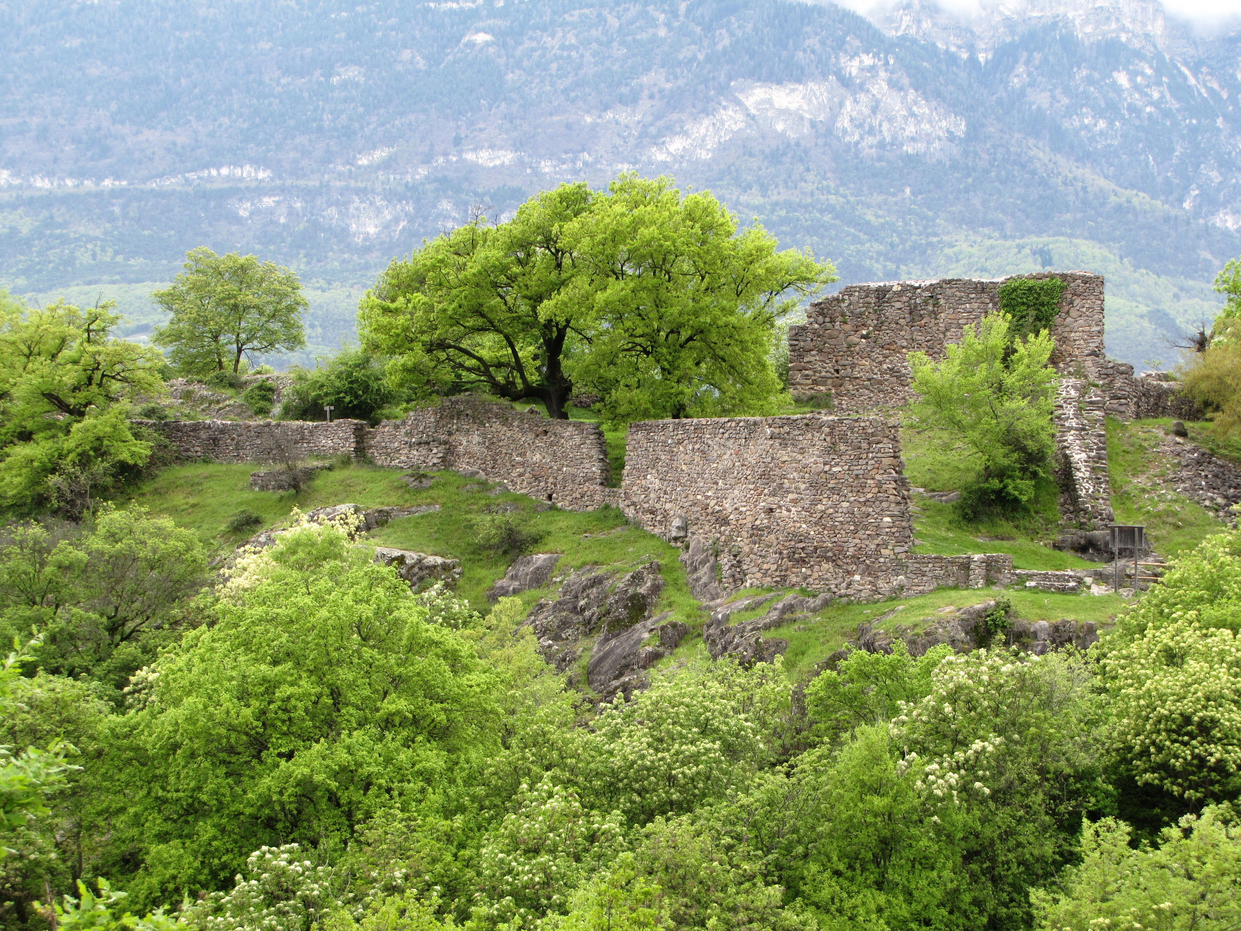 Castelfeder: Romanische Burg, um 1000 Sitz der Grafen von Enn